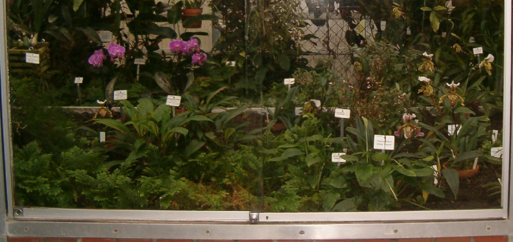 Botanischer Garten Dresden, Greenhouse Picture taken by: User:BotBln Date: 2007-02-19